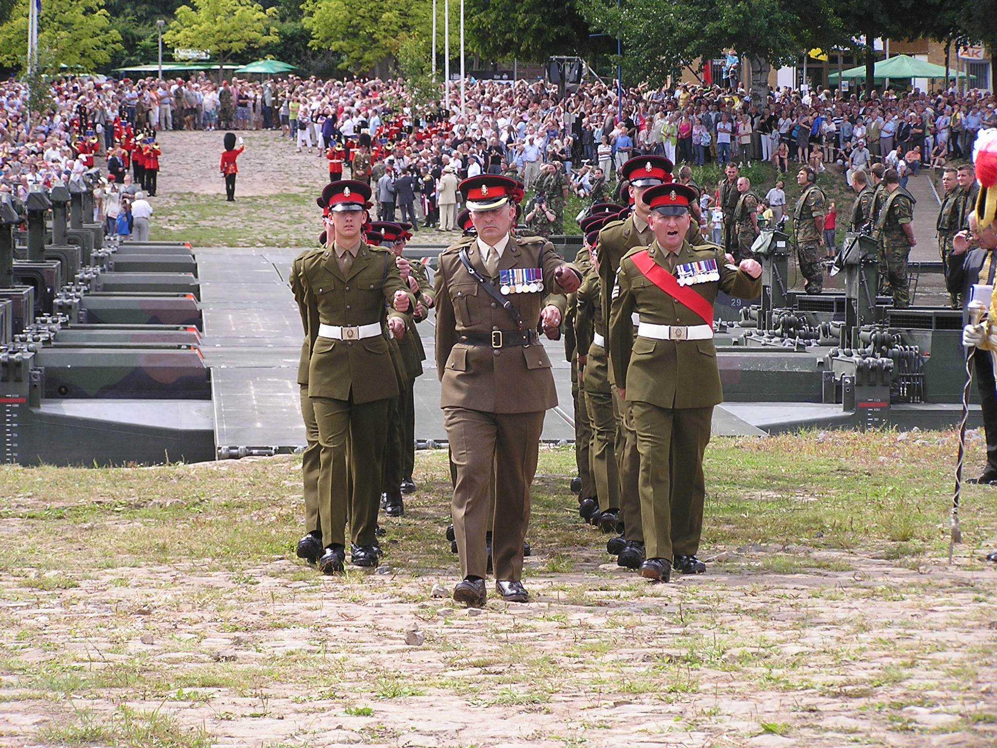 Schlacht bei Minden, 250 jähriges Jubiläum